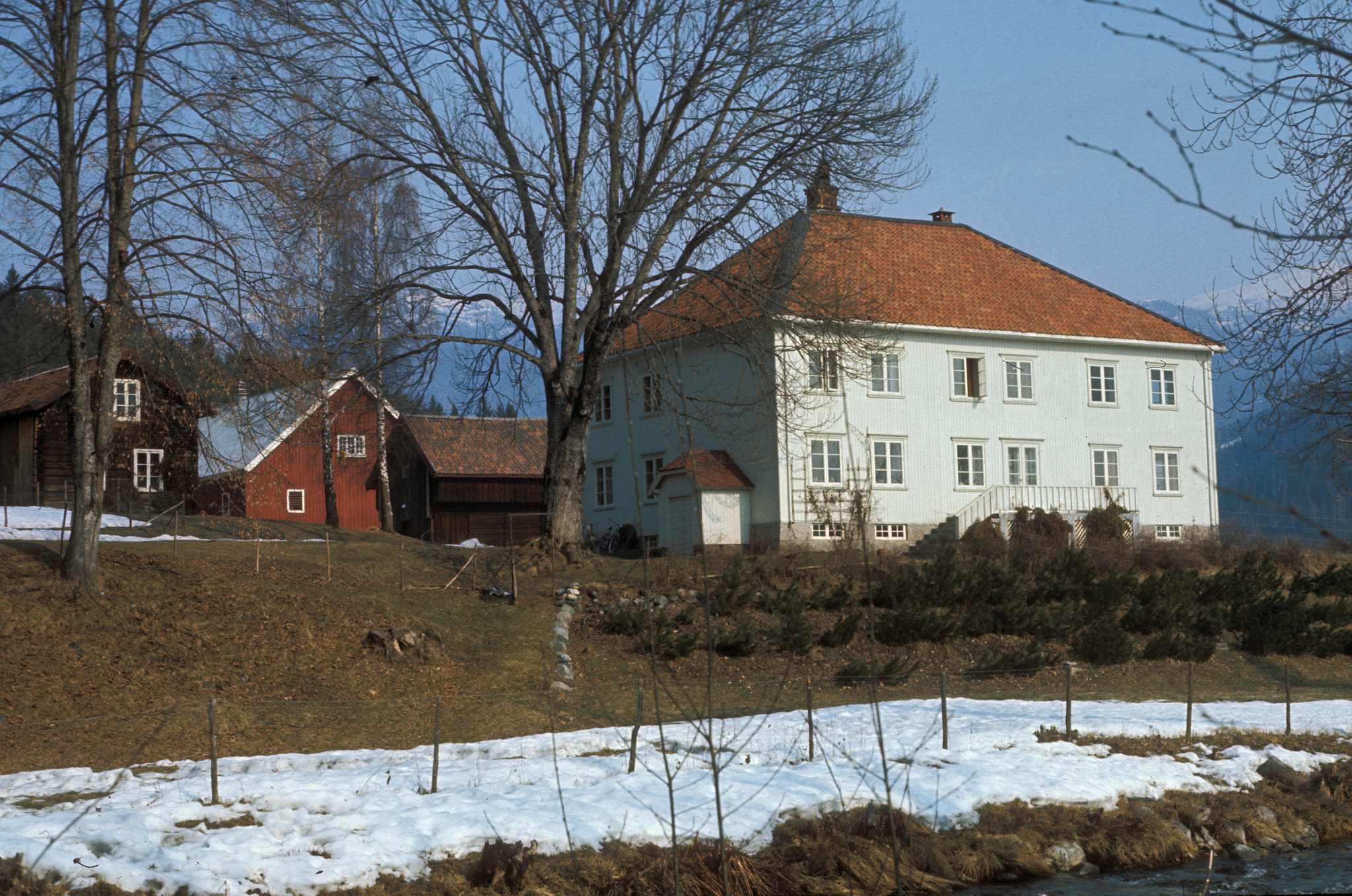 Seljord prestegård. Foto: Ina Backer, fra Riksantikvarens Kulturminnebilder.